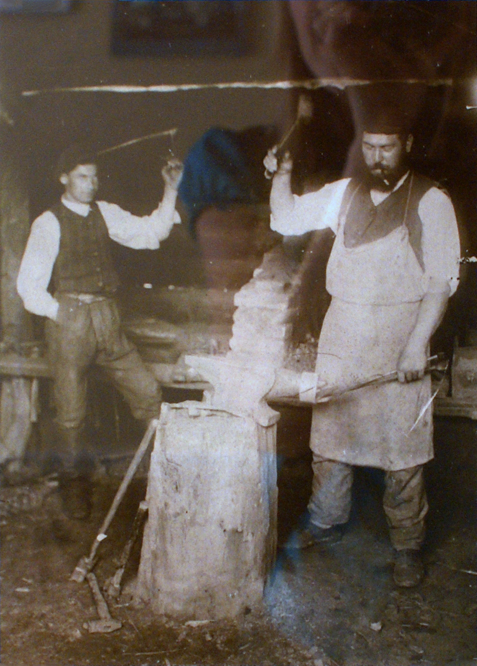 Кавалі. Саламон Юдовін (магчыма). Фота. Копія. Арыгінал ў Нацыянальнымі гістарычным музеі РБ